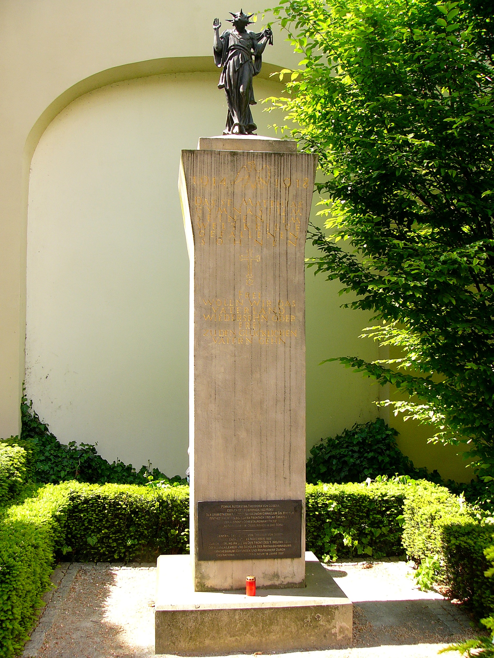 Denkmal von Theodor von Gosen. Enthüllt am 6. November 1922 im Gedenken an die im 1. Weltkrieg gefallenen Lehrer und Schüler des Mathesianum in Breslau.